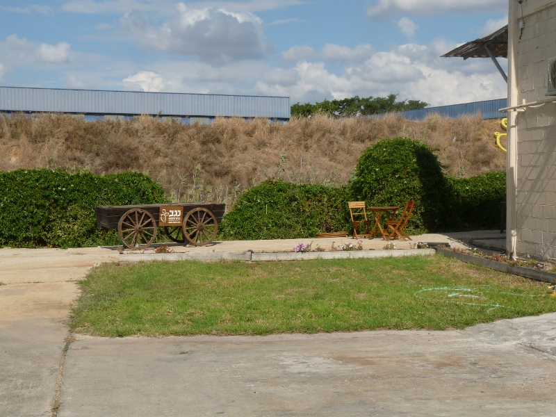 כניסה של חצר המבשלה